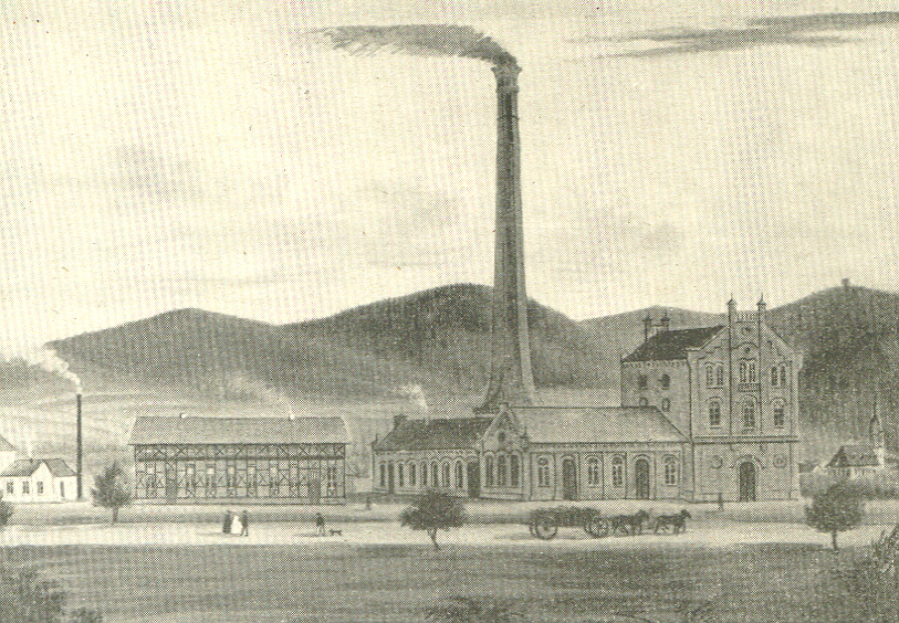 Die Zeche Mittelfeld (Carl-August-Schacht) in Ilmenau (Thüringen) um 1860.